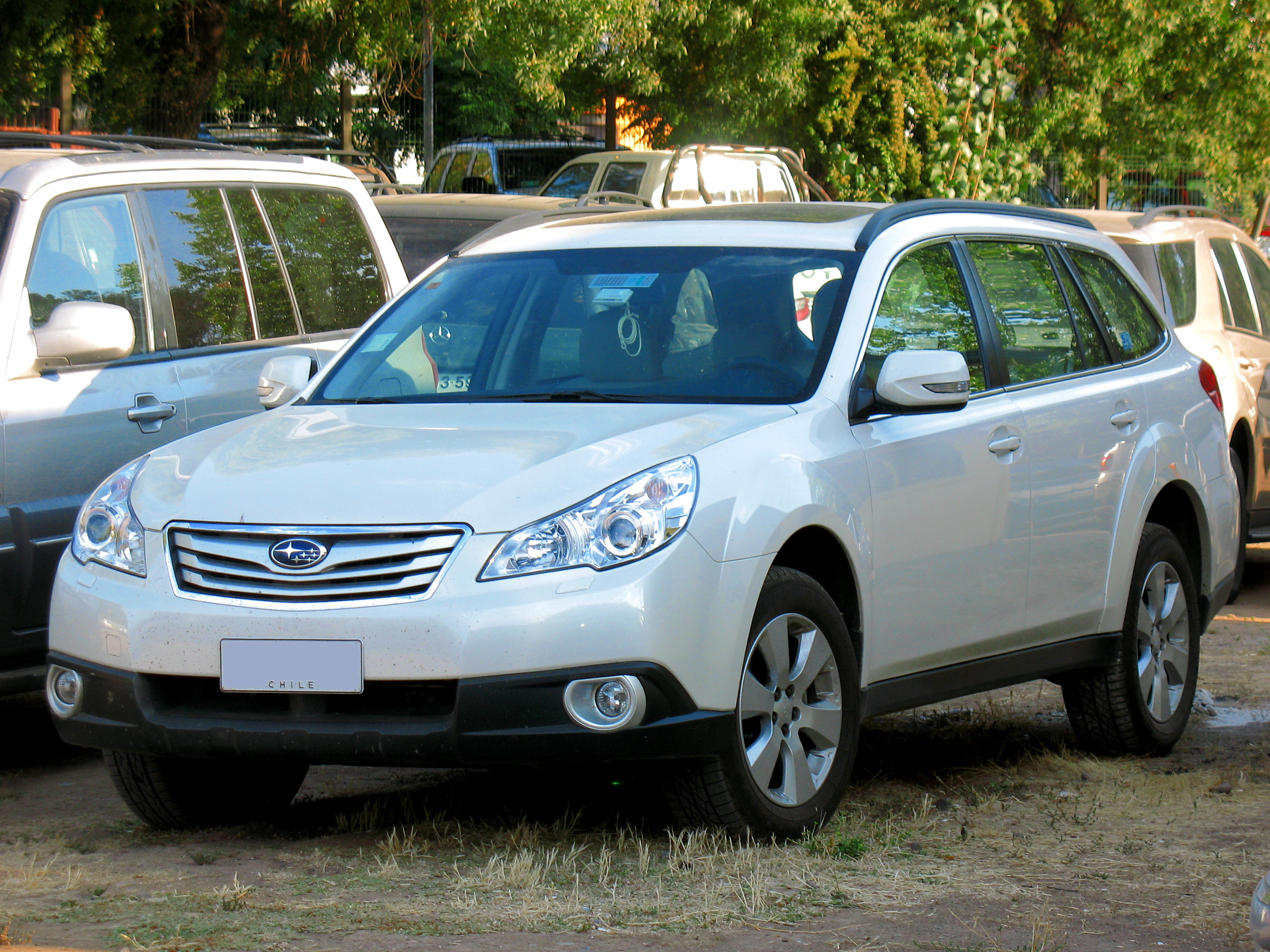 Subaru Outback 2.5i Limited 2010